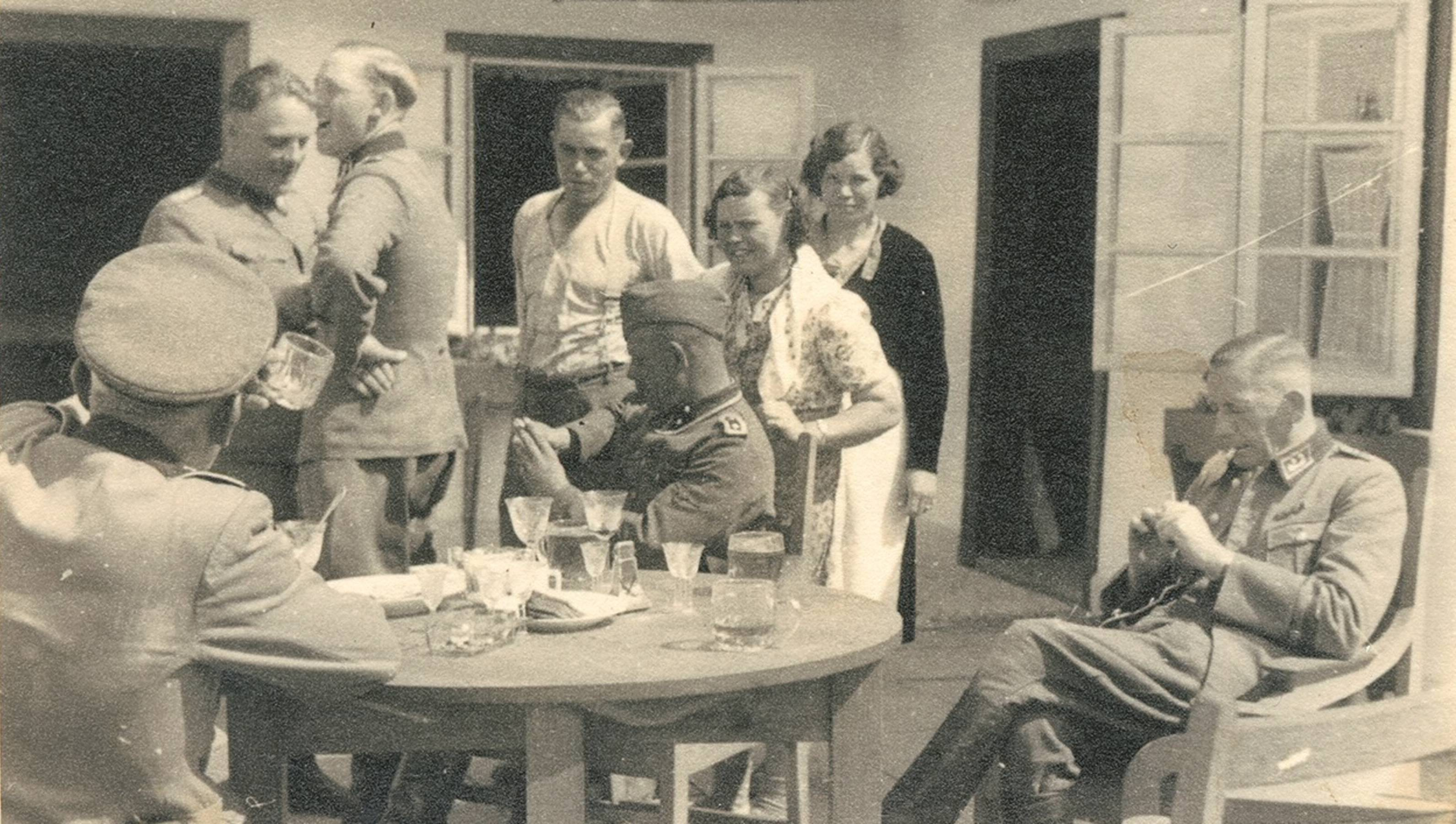 SS-officieren op het terras van hun eetzaal. 2e van rechts commandant Reichleitner, naast hem Johann Niemann